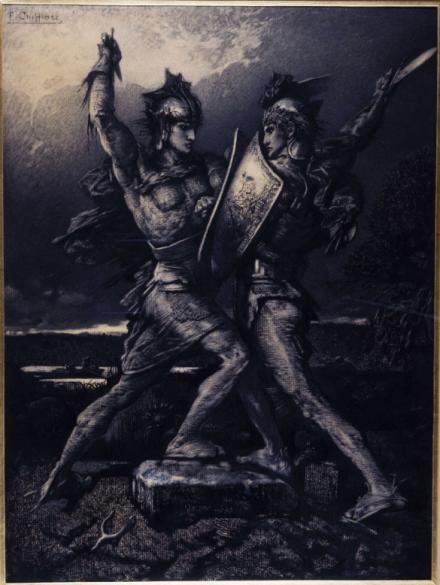 Le Mariage de Roland (d'après Victor Hugo)